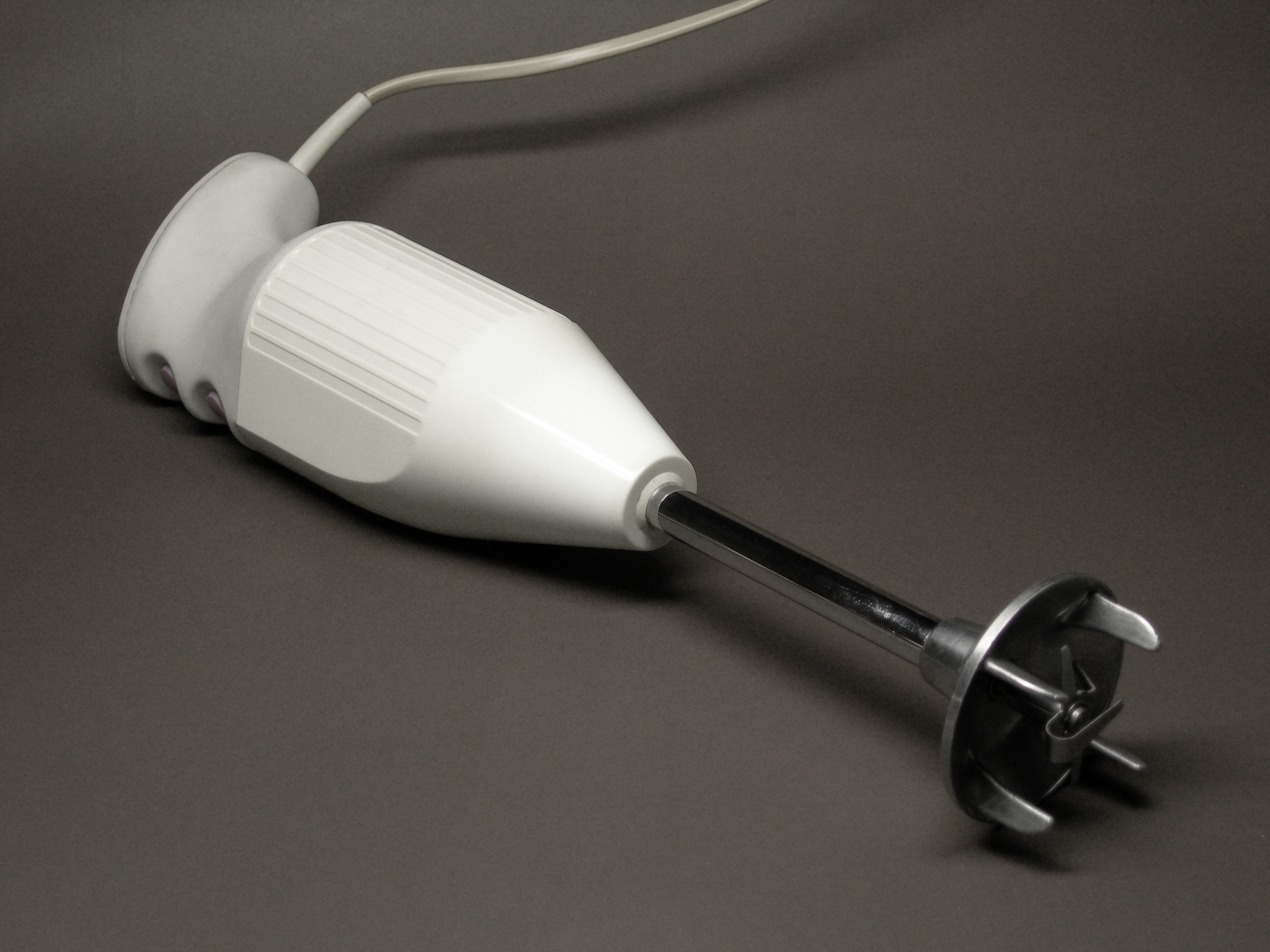 Pürierstab (Hersteller ESGE, also selling under Bamix brand)